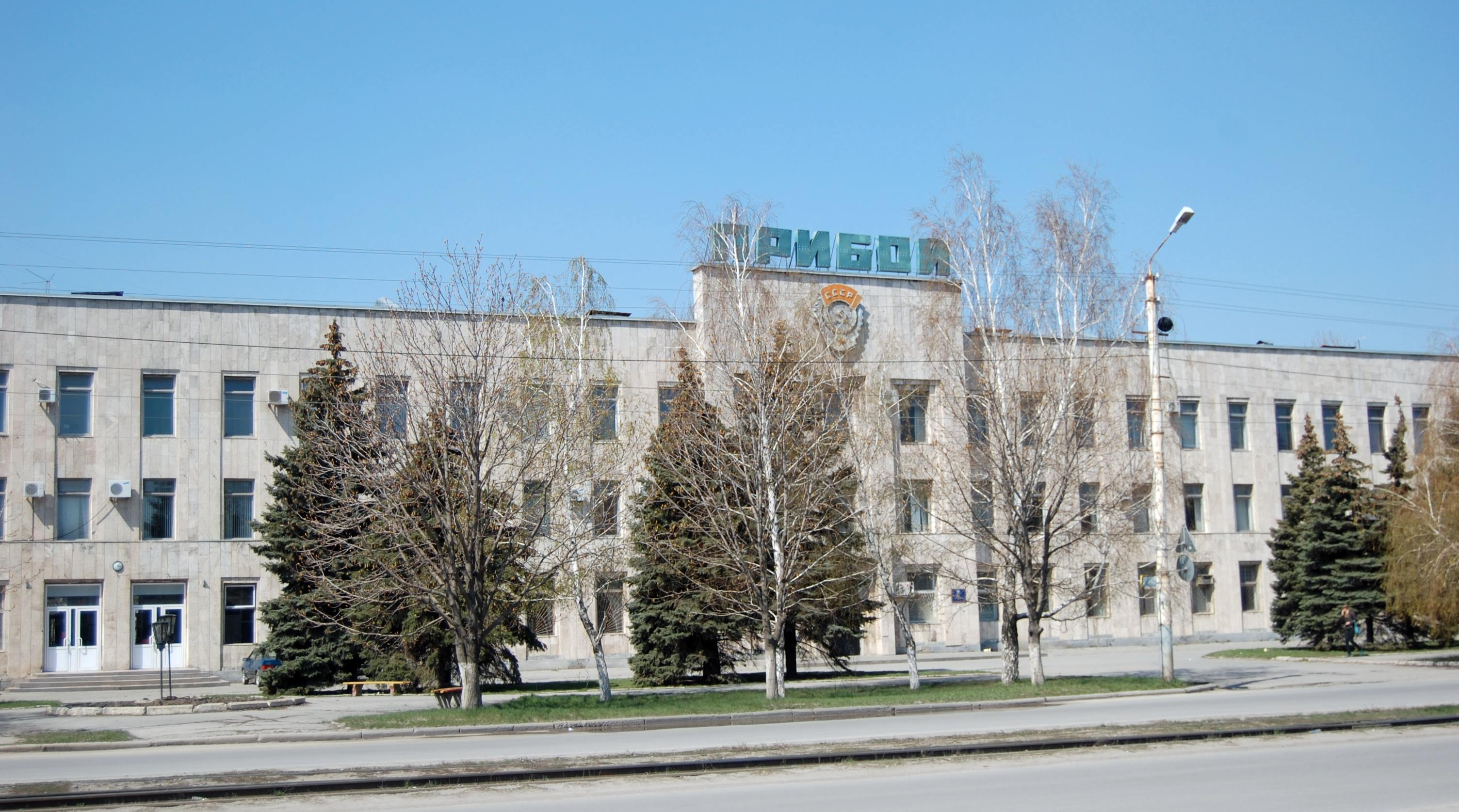 Здание заводоуправления ОАО "Таганрогский завод "Прибой""